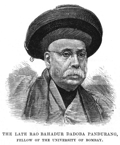 Dadoba Pandurang (9 May 1814-17 October 1882)